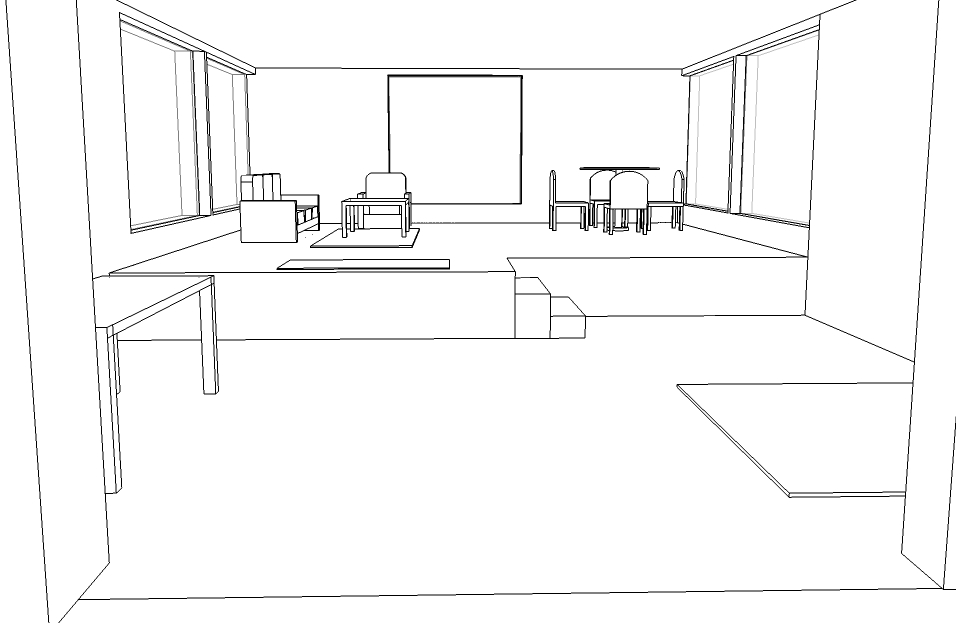 Vista prospettica del padiglione italiano presentato all'interno della Mostra internazionale dell'abitazione dell'abitazione alla XI edizione della Triennale di Milano